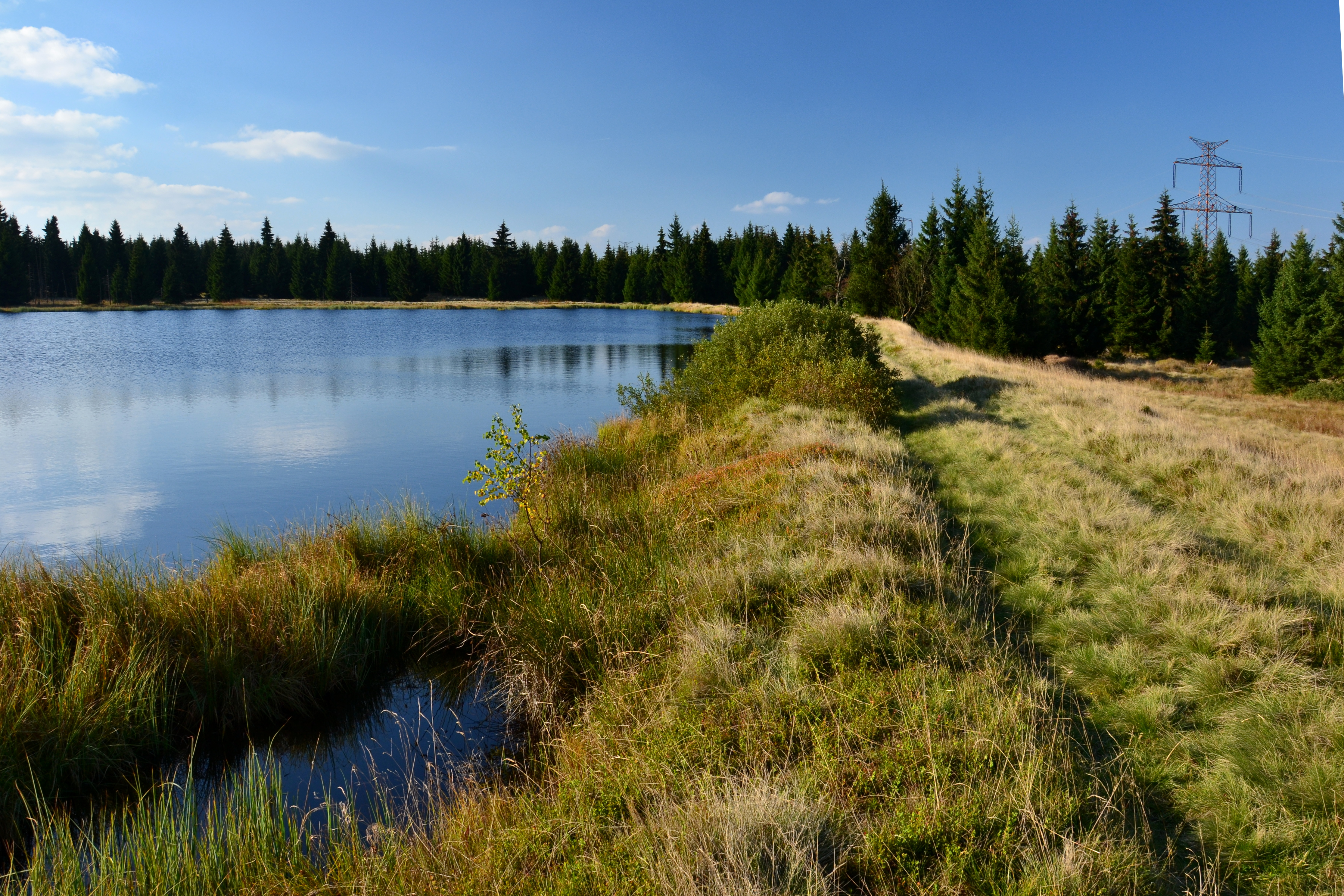 Hráz Novoveského rybníka